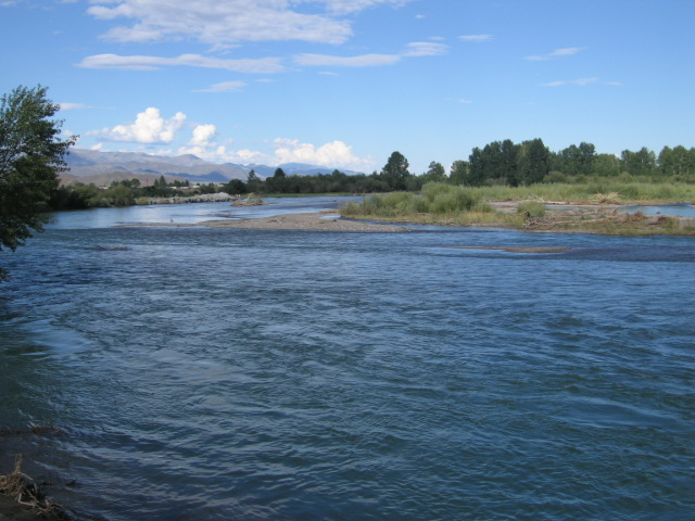 река Хемчик вблизи Кызыл-Мажалыка.